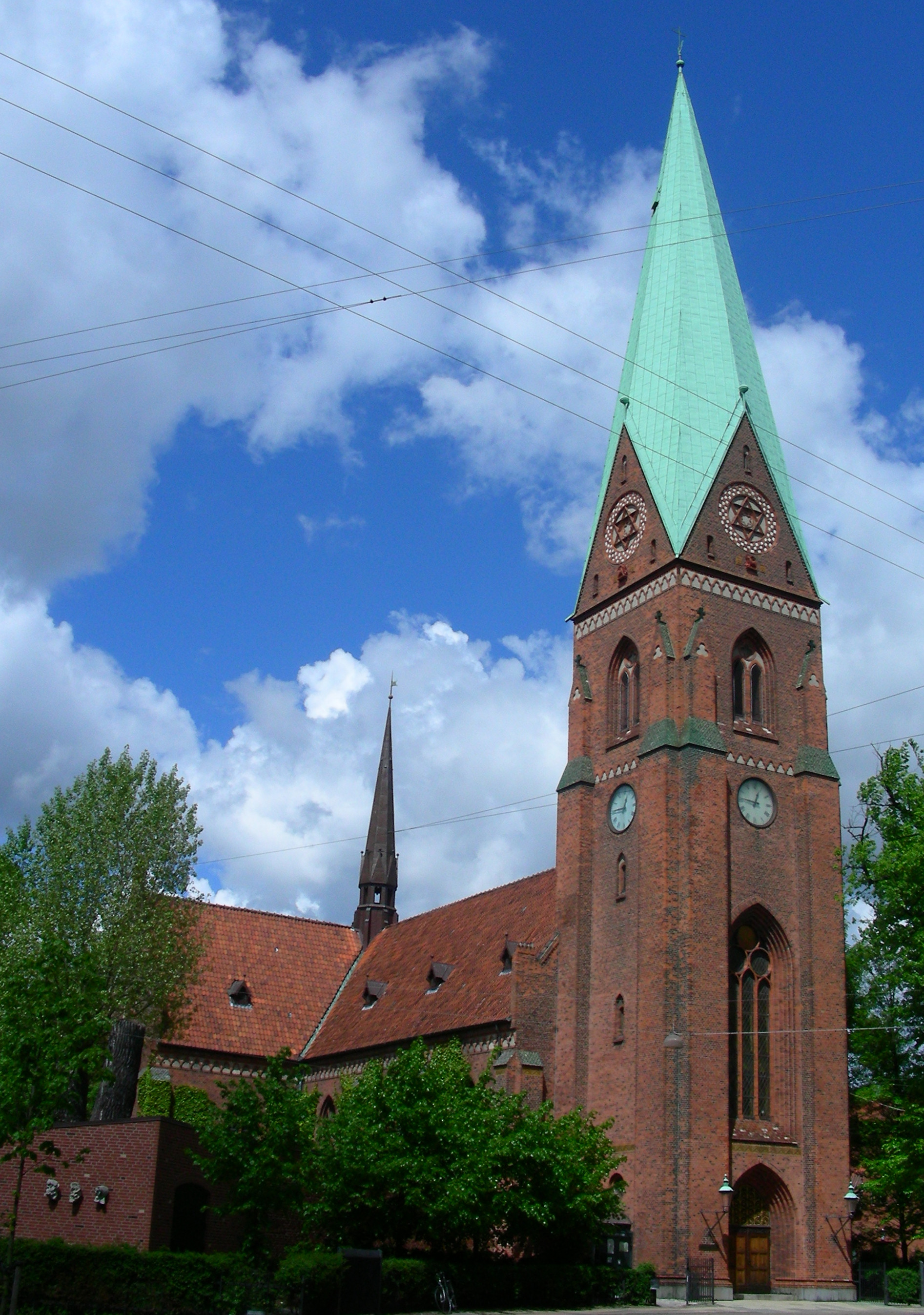 Hellig Kors Kirke, Copenhagen, Denmark.